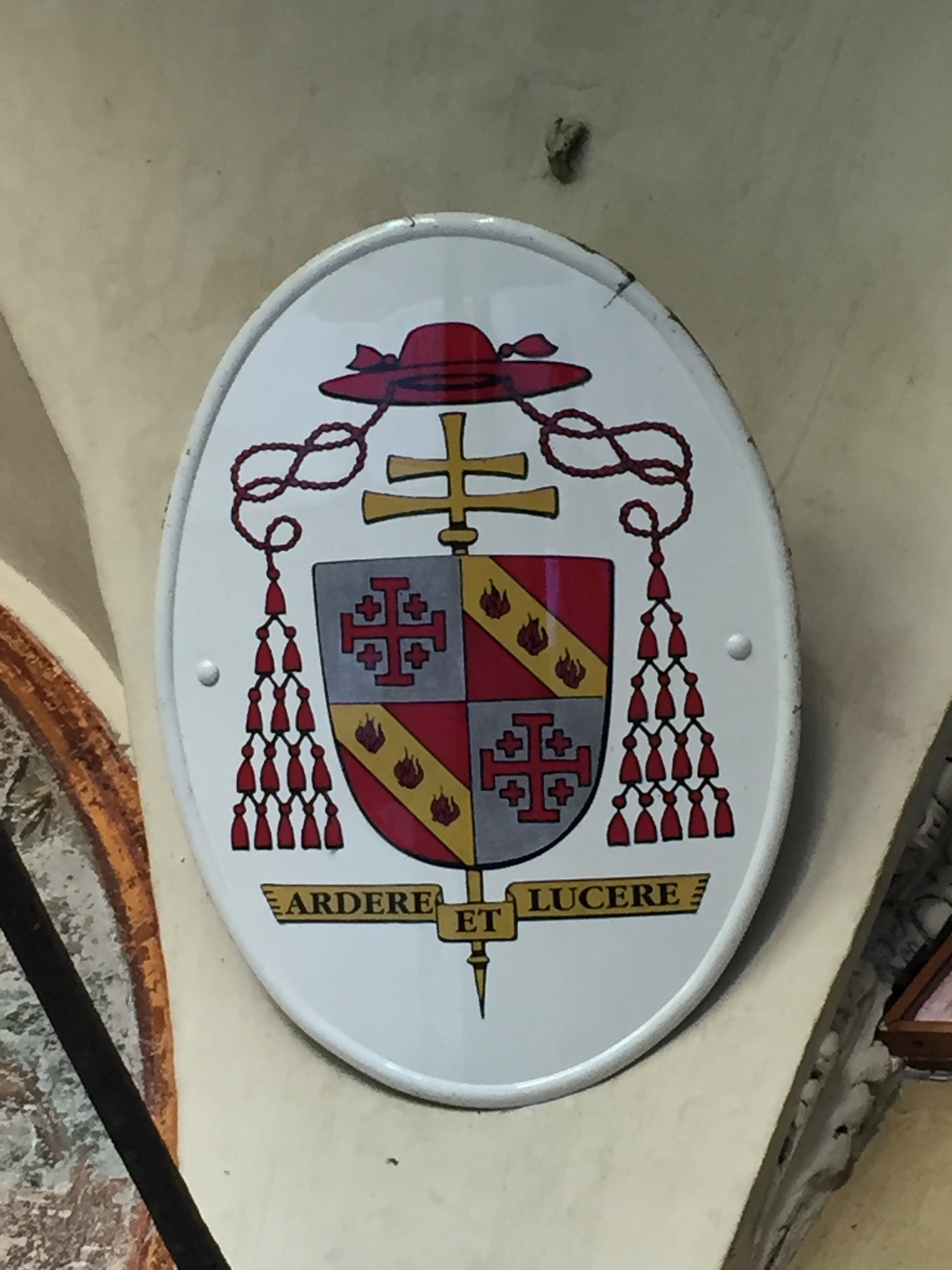 Carlo Kardinal Furno: Wappen in der römischen Kirche Sant'Onofrio al Gianicolo am Verwaltungssitz des Ritterordens vom Heiligen Grab zu Jerusalem